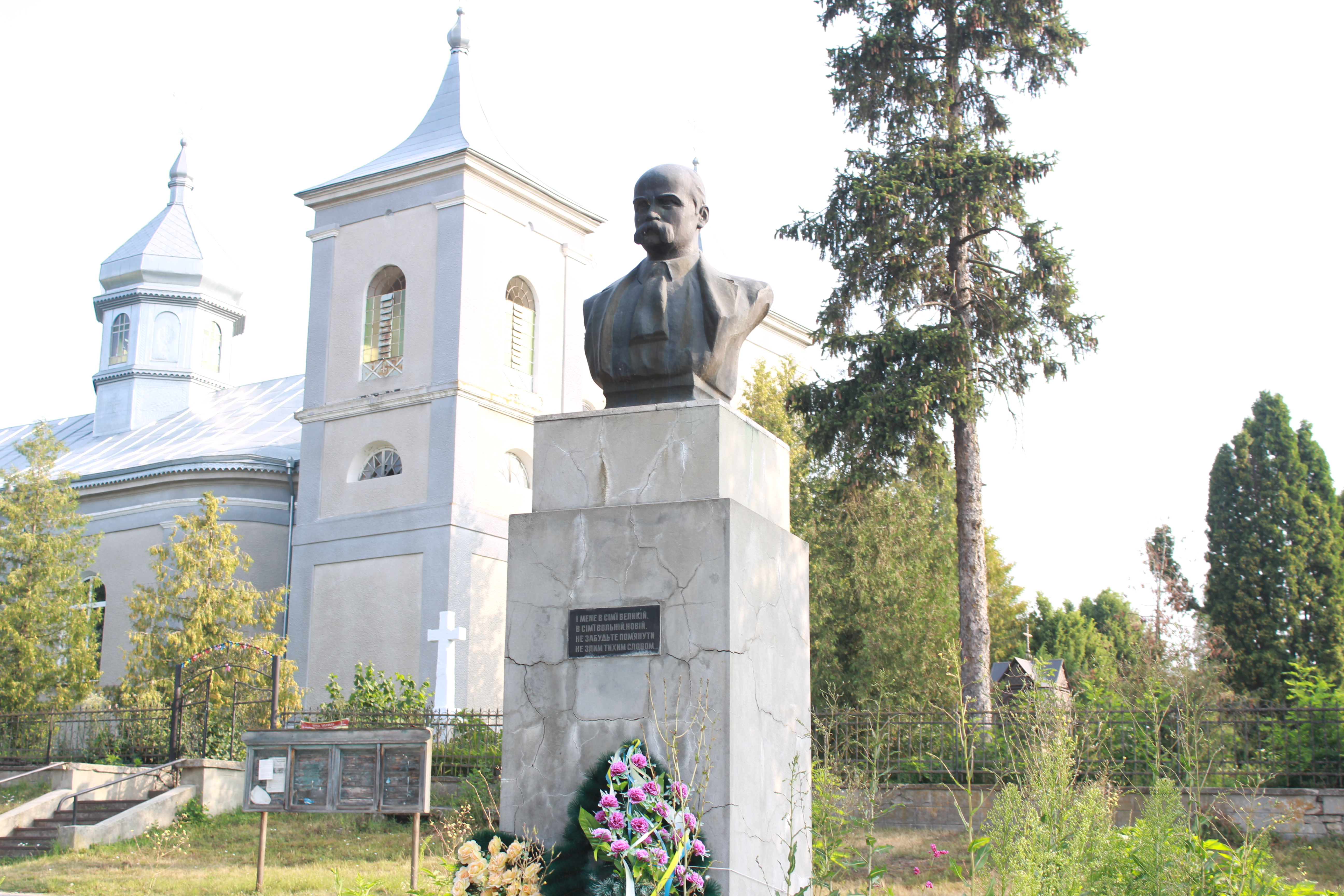 Пам'ятник поету, письменнику, художнику Шевченку Тарасу Григоровичу, село Торське